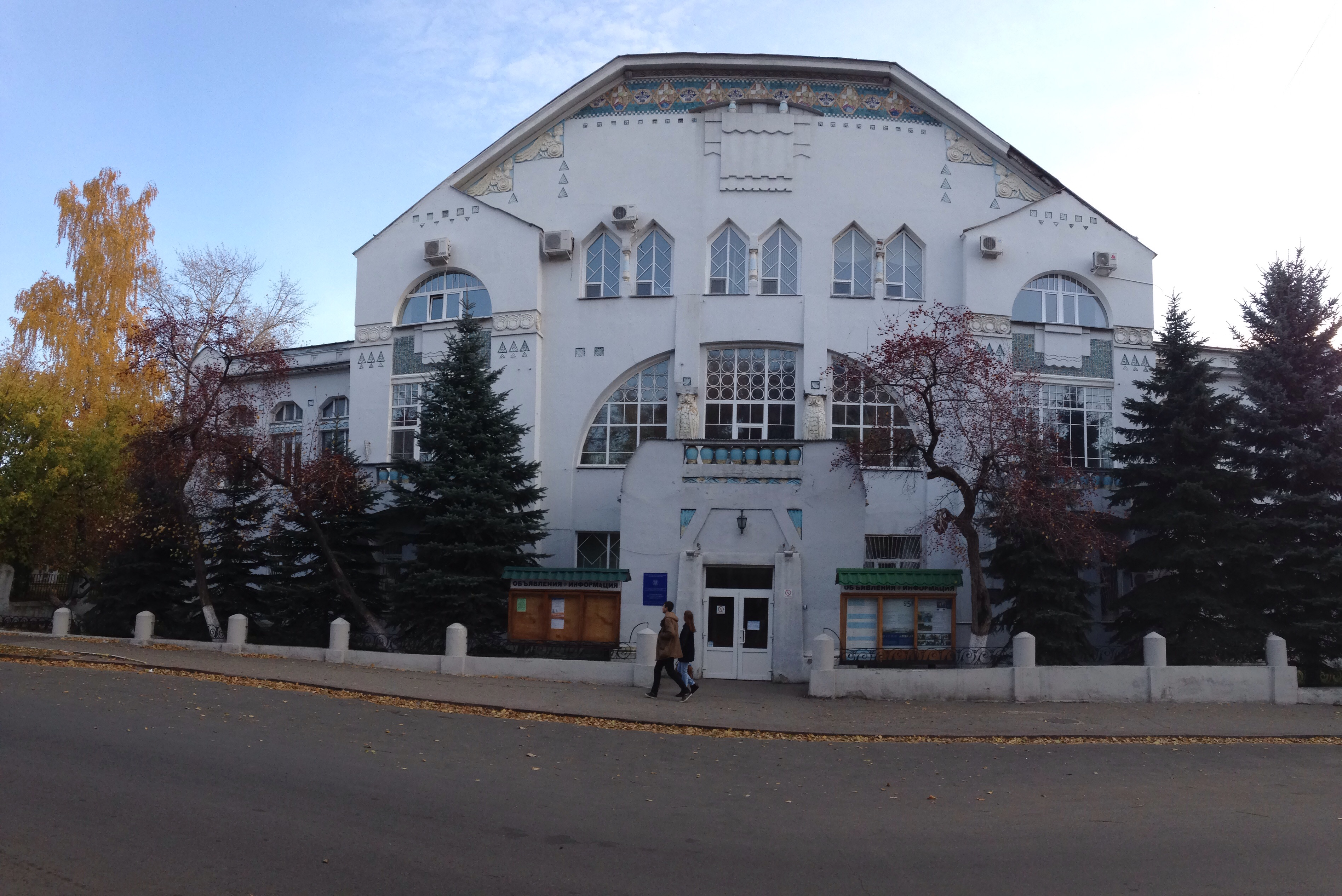 Ансамбль зданий Симбирского поземельного банка (Ульяновская область, Ульяновск, улица Льва Толстого, 42)